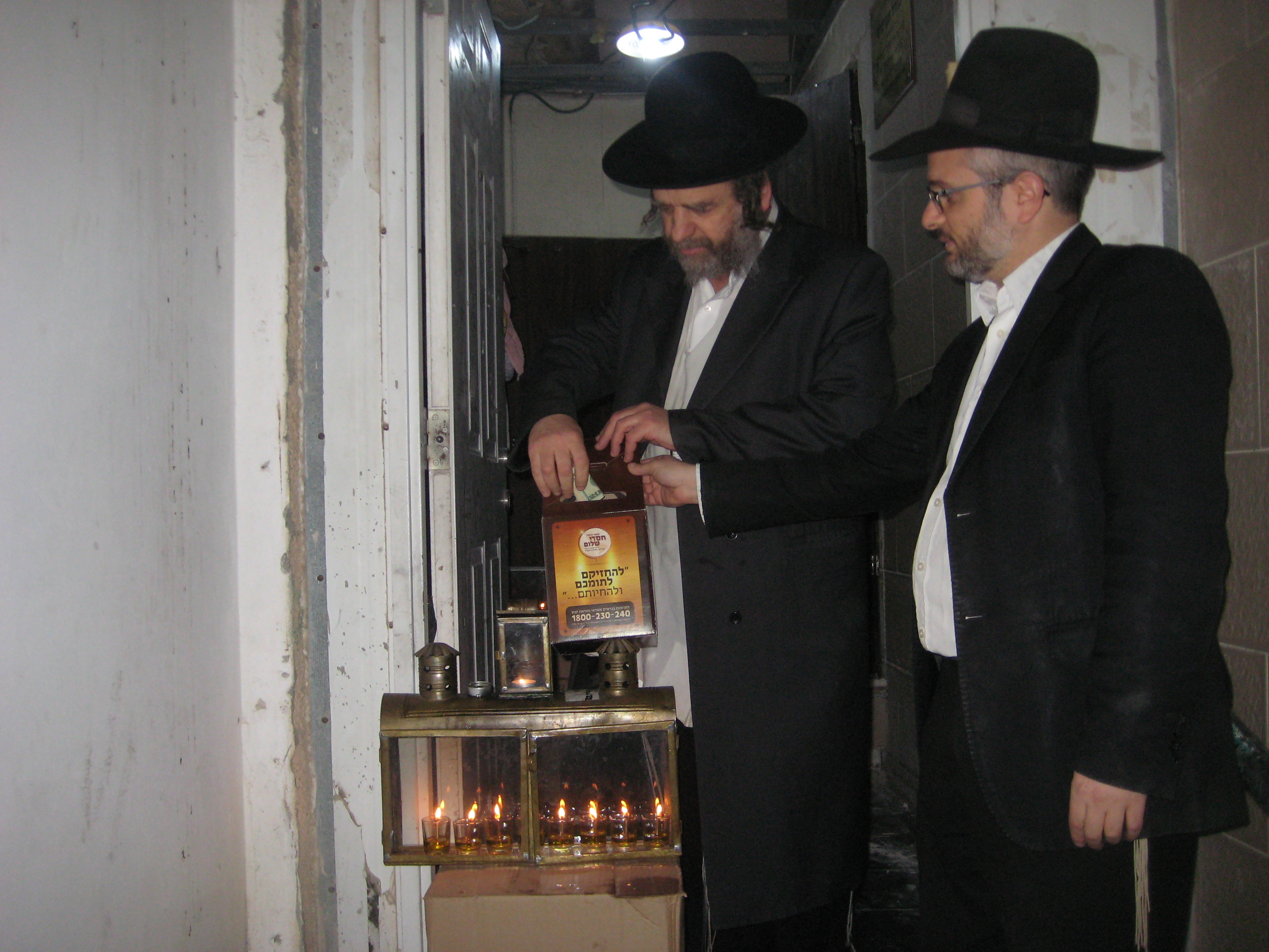 הרב קארפ מרבני קרית ספר תורם צדקה בהדלקת נרות חנוכה